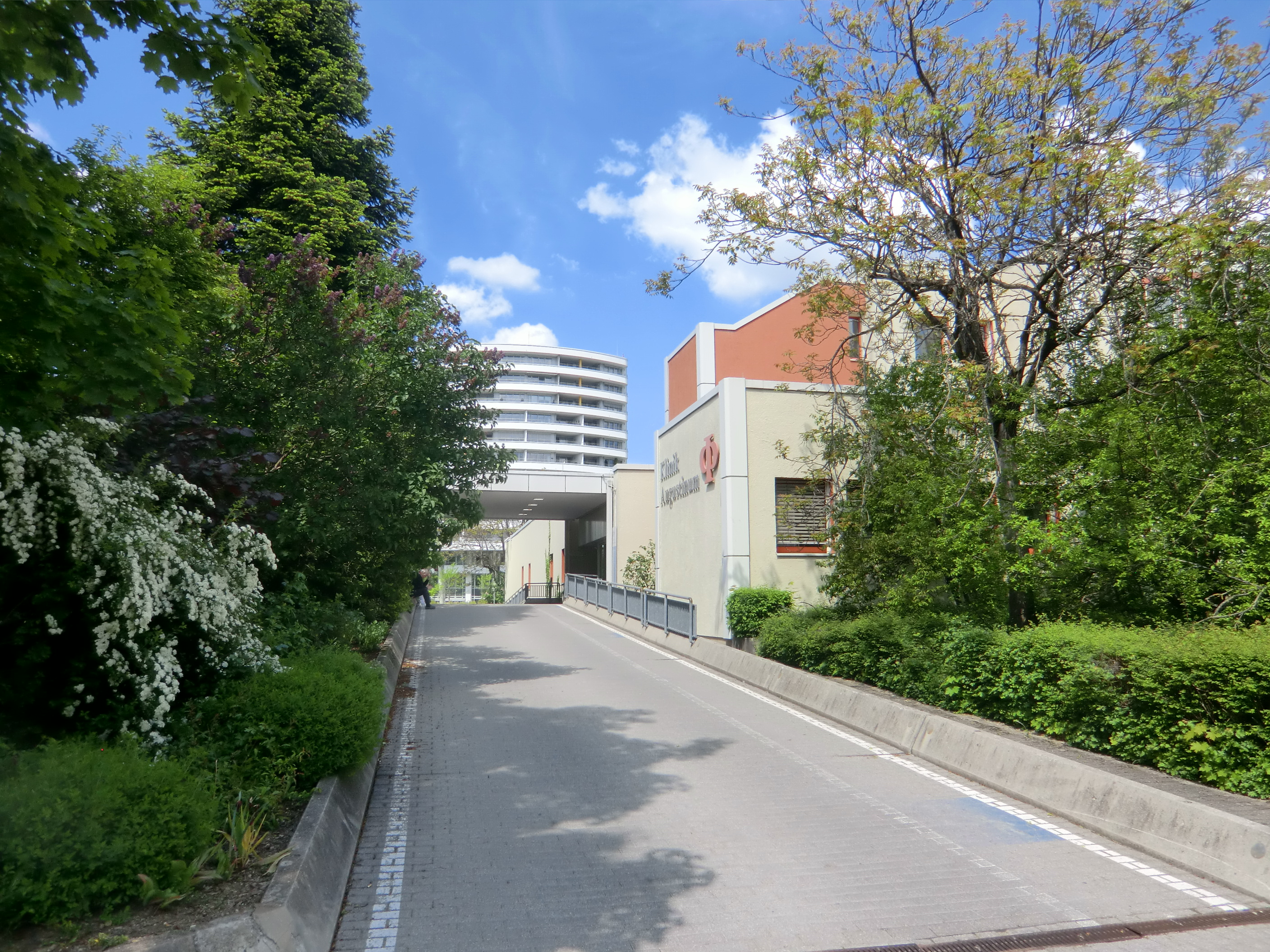 Klinik Augustinum Auffahrt Südseite Totale